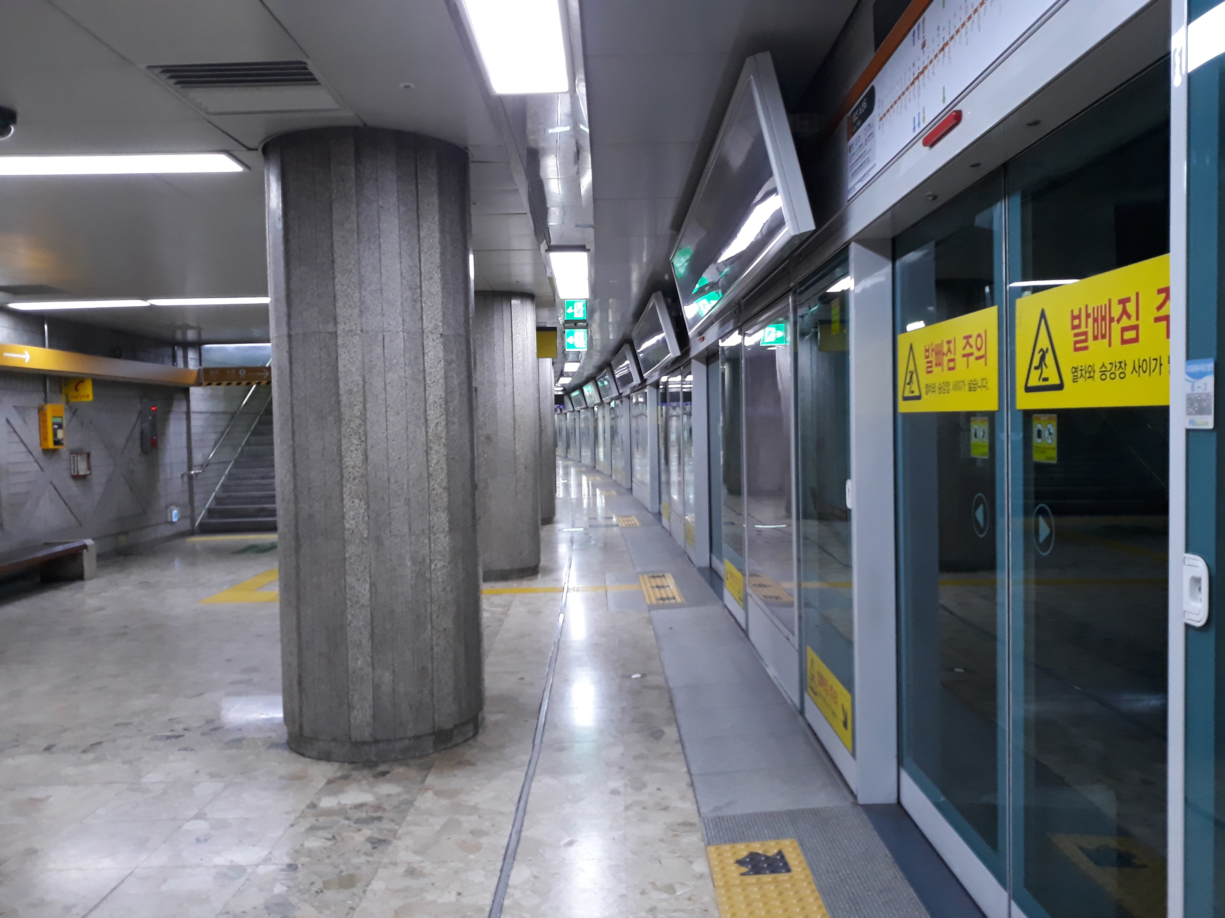 부산 도시철도 1호선 연산역 다대포해수욕장 방면 승강장